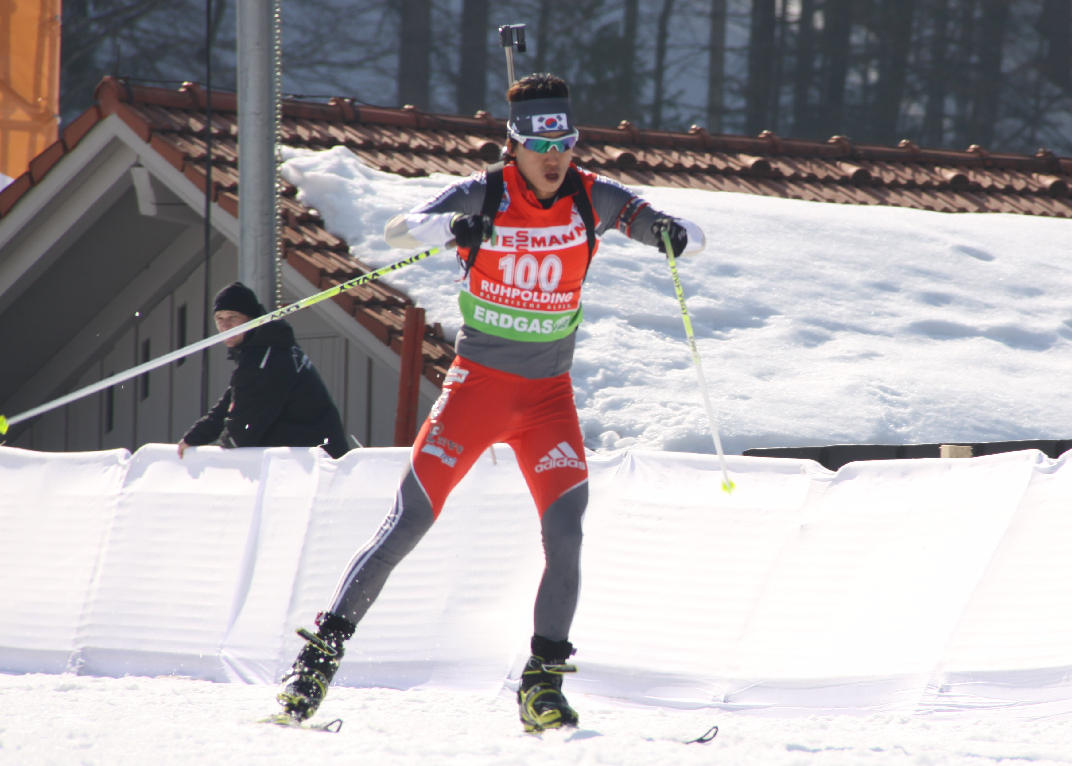 In-Bok Lee